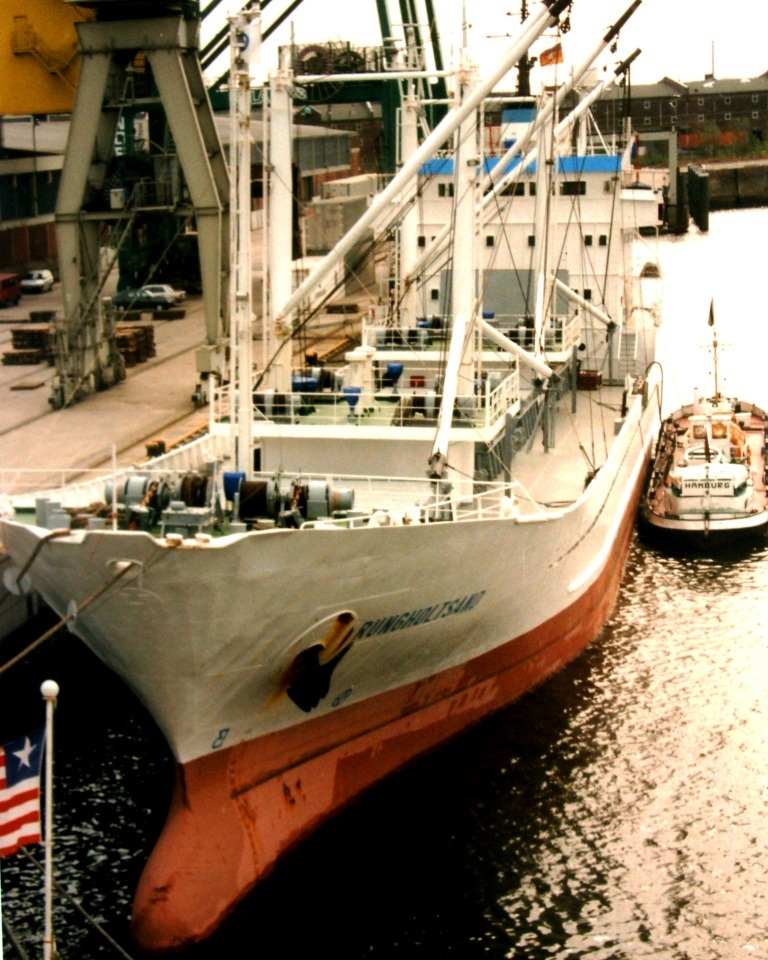 Das Kühlschiff Rungholtsand lädt in Hamburg IMO Number: 7920546